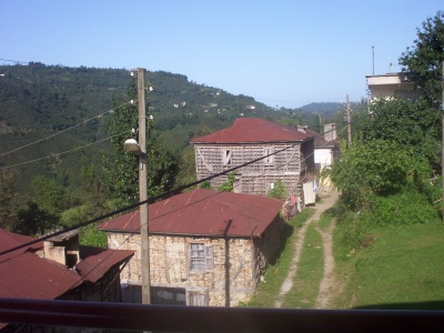 Kestane, a village in Gülyalı district of Ordu province, Turkey (Bu resimi kendi evimden cektim. Gurdlu mahallesi, Kestane koyu.)